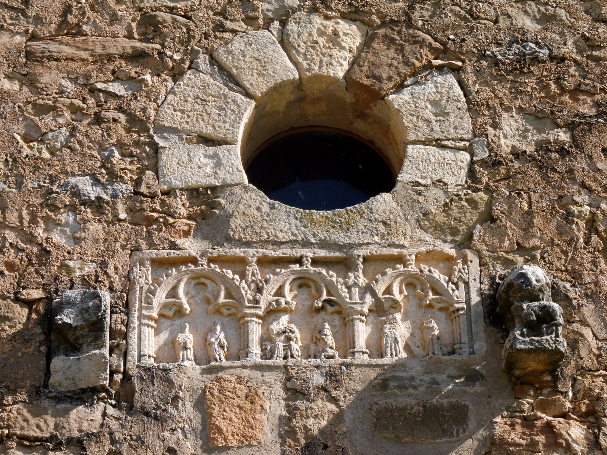 Església de Sant Miquel de Rubió de Baix (Foradada): ull de bou